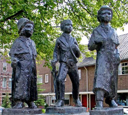 Beeld van de drie podagristen in Coevorden t.w. A.L. Lesturgeon (1815-1878, predikant te Oosterhesselen en Zweeloo), Dubbeld Hemsing van der Scheer (1791-1859, uitgever en schrijver te Coevorden) en Harm Boom (1810-1885, dagbladschrijver te Assen)